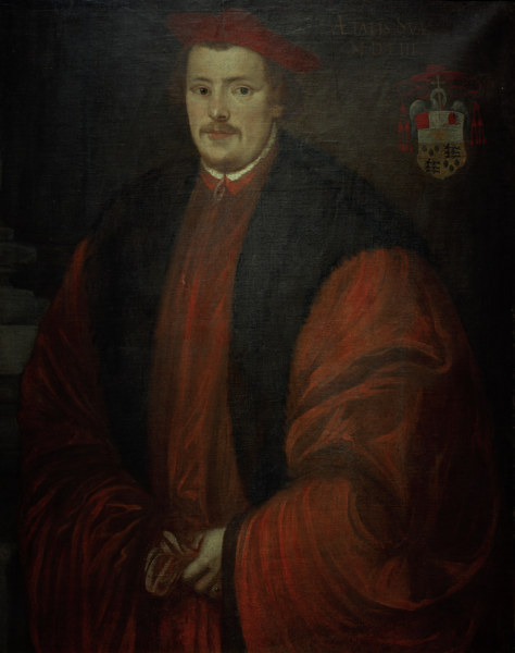 Kardinal Otto Truchsess von Waldburg-Trauchburg (1514–1573)